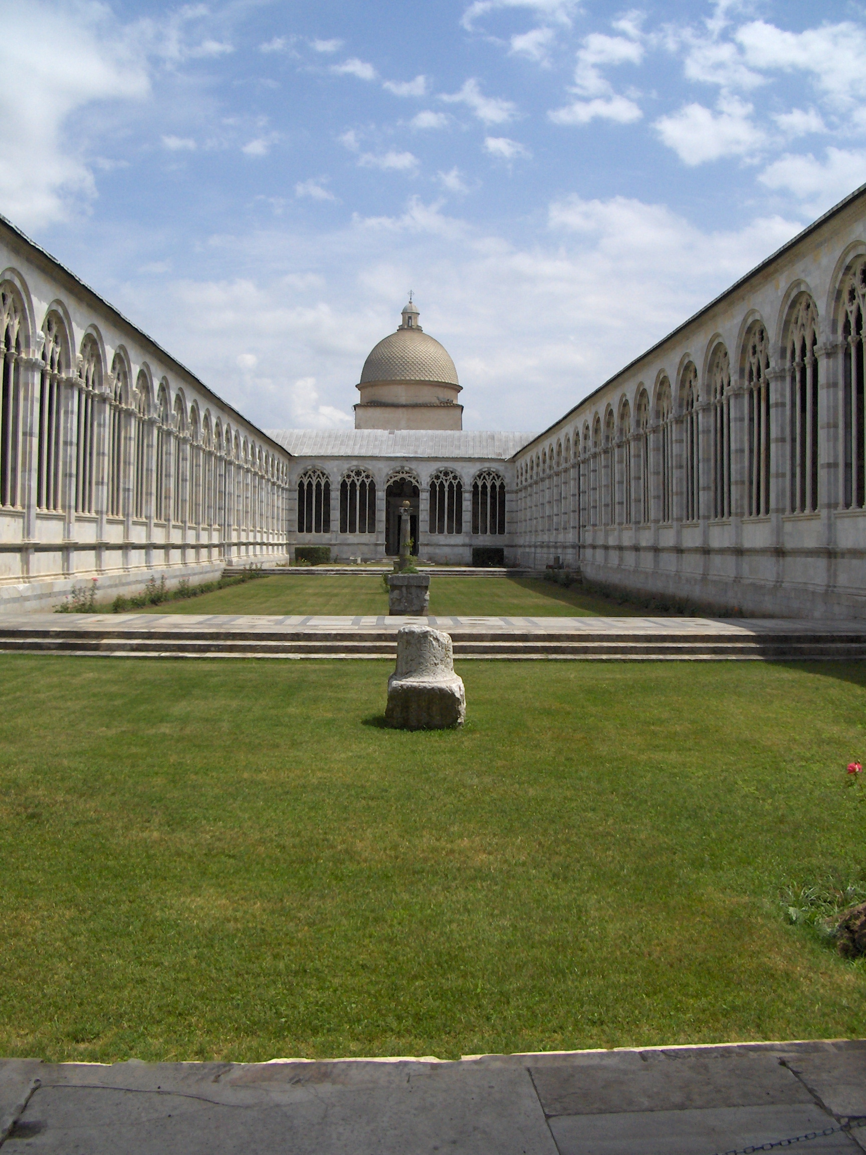 Camposanto van binnen - zelf gefotografeerd op 8 juli 2005 op het Campo Miracoli in Pisa, Toscane, Italië.